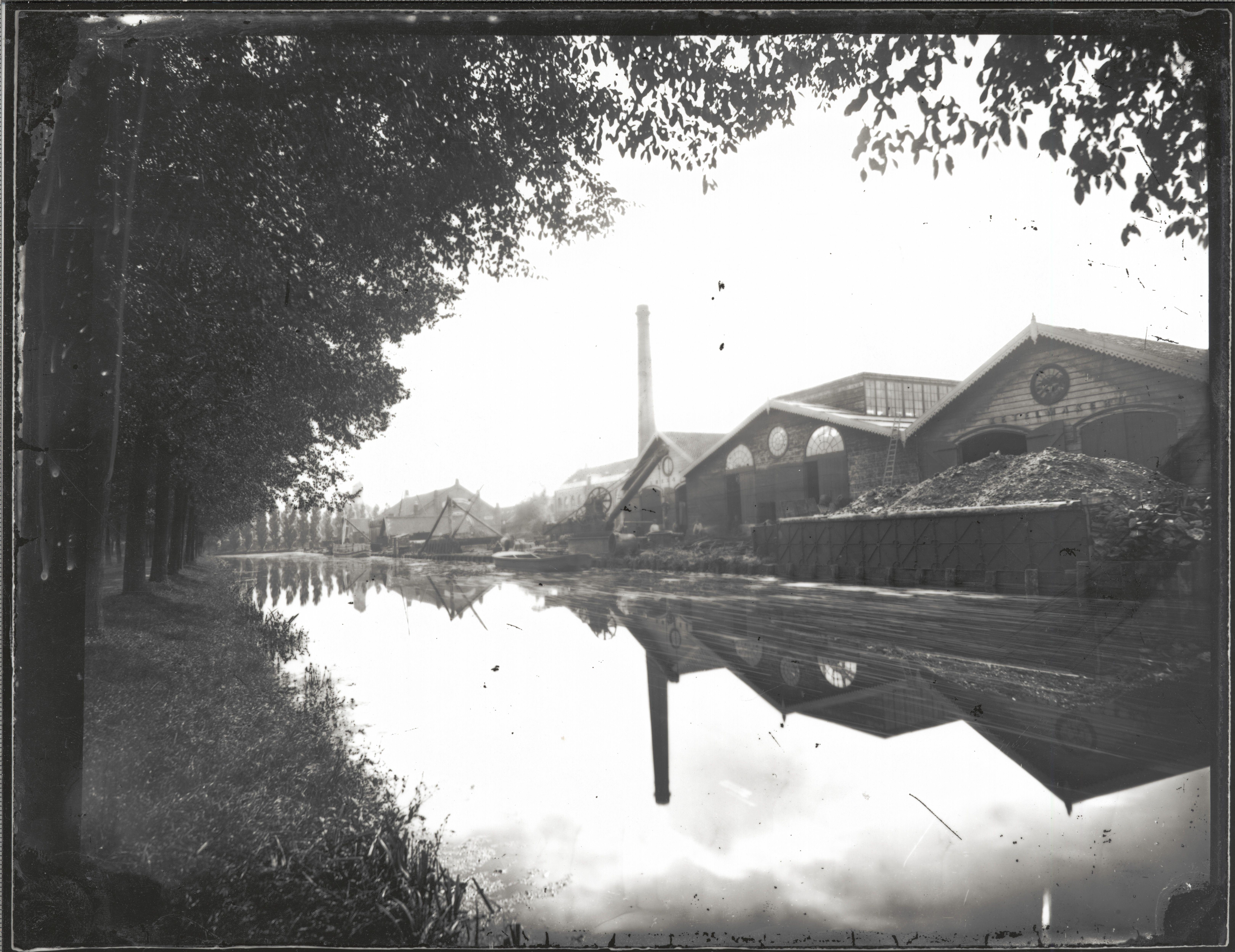 Gezicht op de ijzergieterij en fabriek van stoom- en andere werktuigen van de firma Schretlen & Co te Leiden vanaf de Singel omstreeks 1860. Het bedrijf van Schretlen ontwikkelde zich uit een kleine ijzergieterij en smederij, opgericht in 1834 door de smidszoon D.A. Schretlen. In 1856 verplaatste Schretlen zijn bedrijf uit de binnenstad naar de vestwal, waar een aantal houten loodsen, een stenen kantoor, een machinegebouw en een kraan en loskade werden opgericht. Schretlen was een van de ijzergieterijen die rond het midden van de eeuw zich ook met de vervaardiging van stoommachines bezighield. In dit geval met weinig sukses. Na 1850 legde het bedrijf zich voornamelijk toe op de installatie en beheer van gasfabrieken, giet- en constructiewerk. Ca. 1870